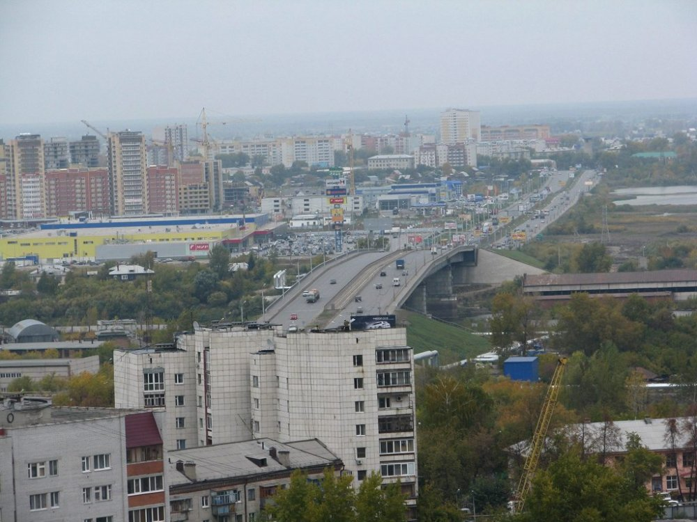 Мост через Туру по ул. Профсоюзной в Тюмени. 3-й Заречный микрорайон.